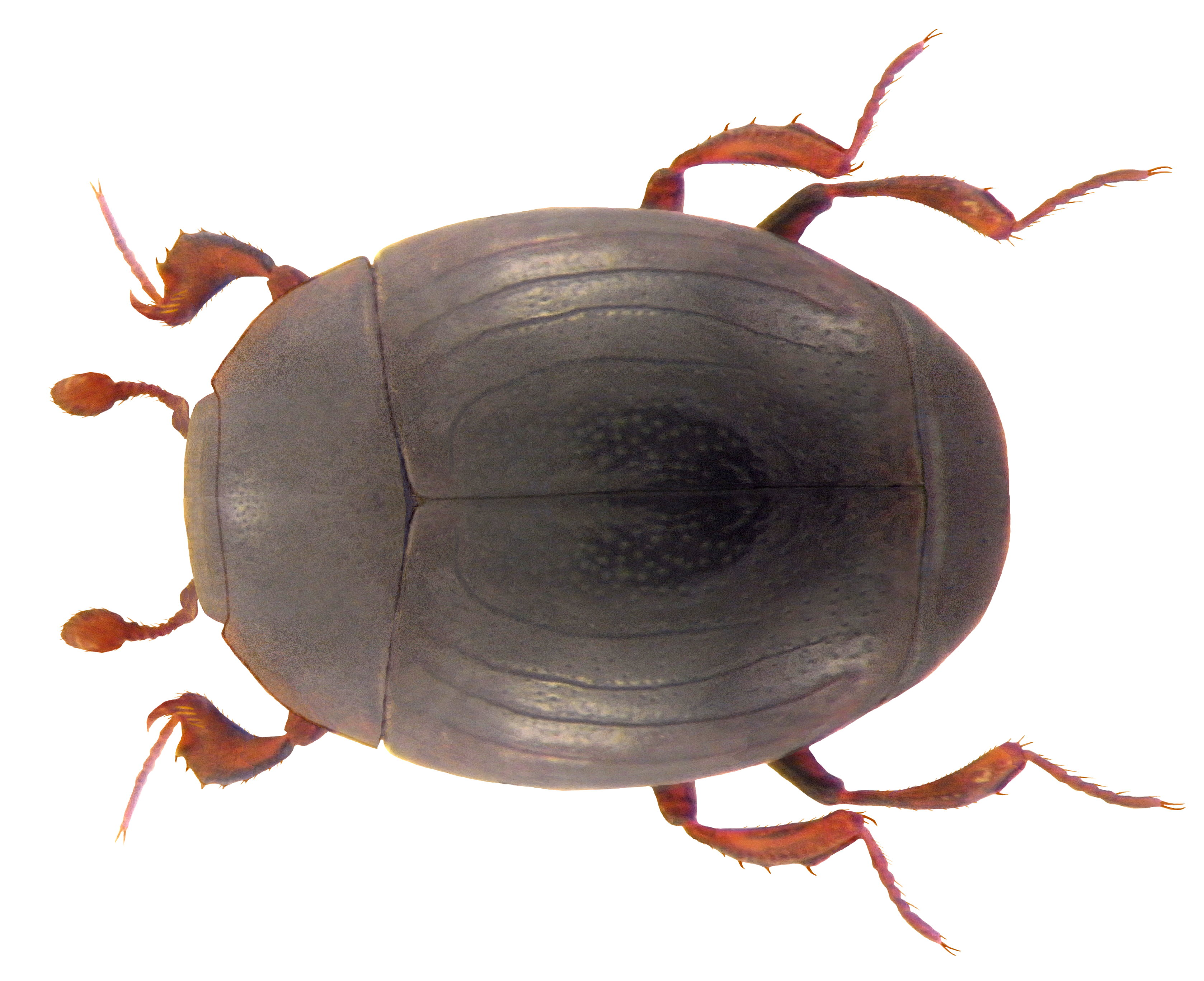 Familie: Histeridae Groesse: 1,3 mm Verbreitung: Europa Ökologie: an trockenen, tierischen Resten Fundort: Germania, Nordrhein-Westfalen, Rees leg. Scharf, 1995; det. Köhler Photo: U.Schmidt, 2009